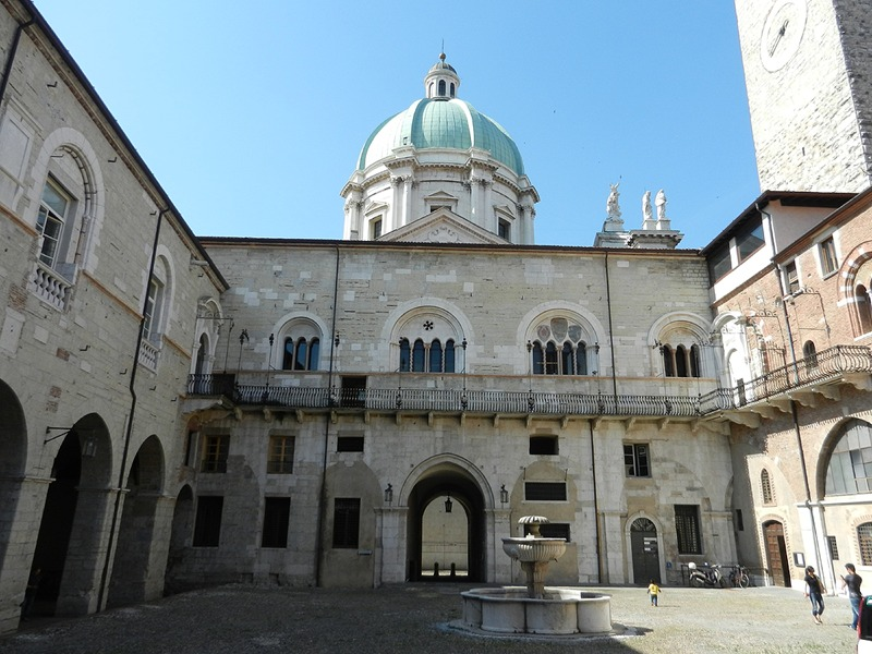 Brescia - Cortile del Broletto